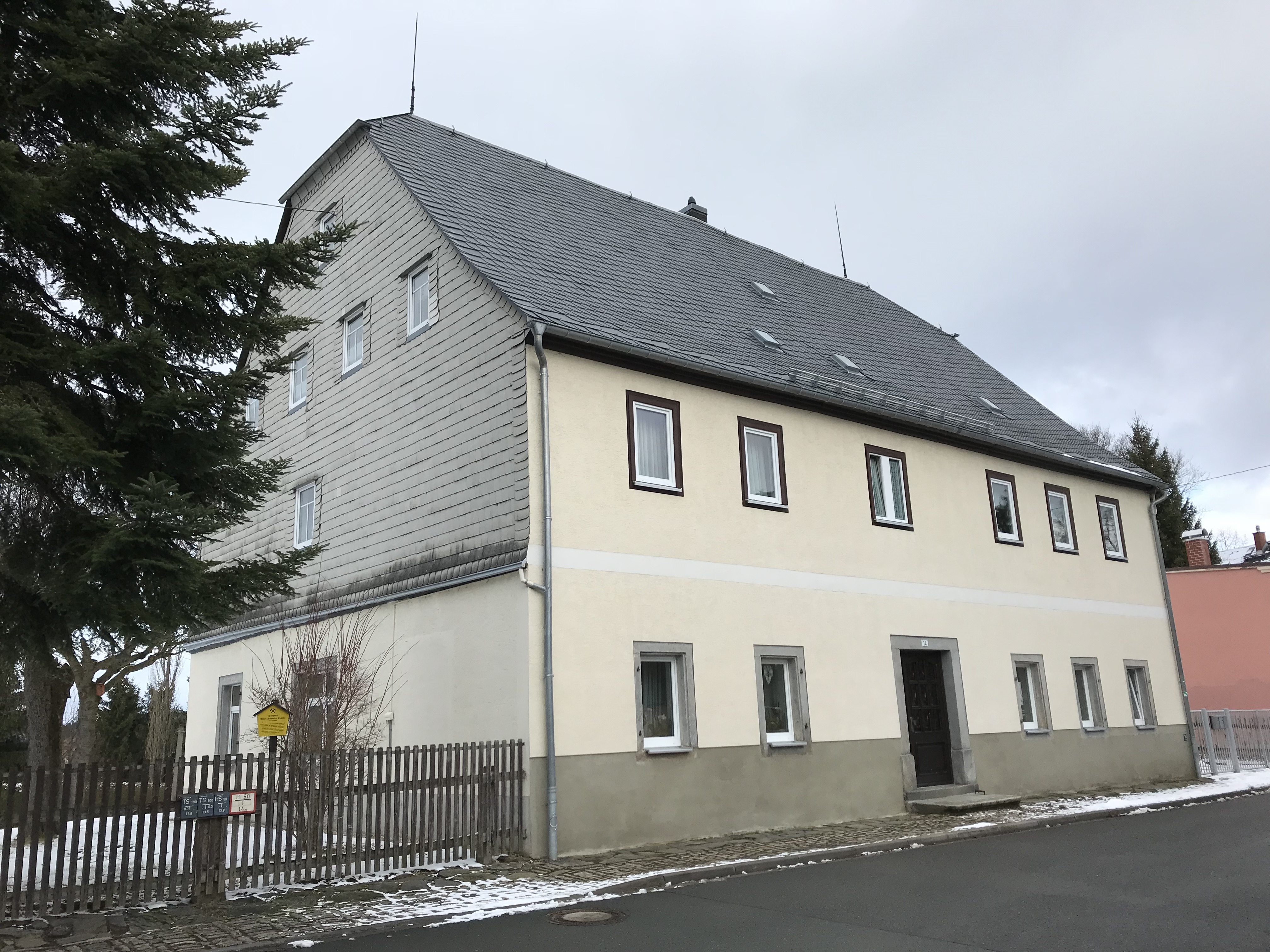 Huthaus des Marx Semmler Stollen, oberes Revier